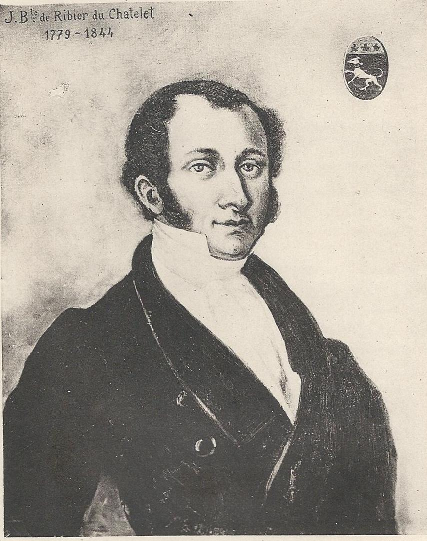 JB de Ribier du Chatelet